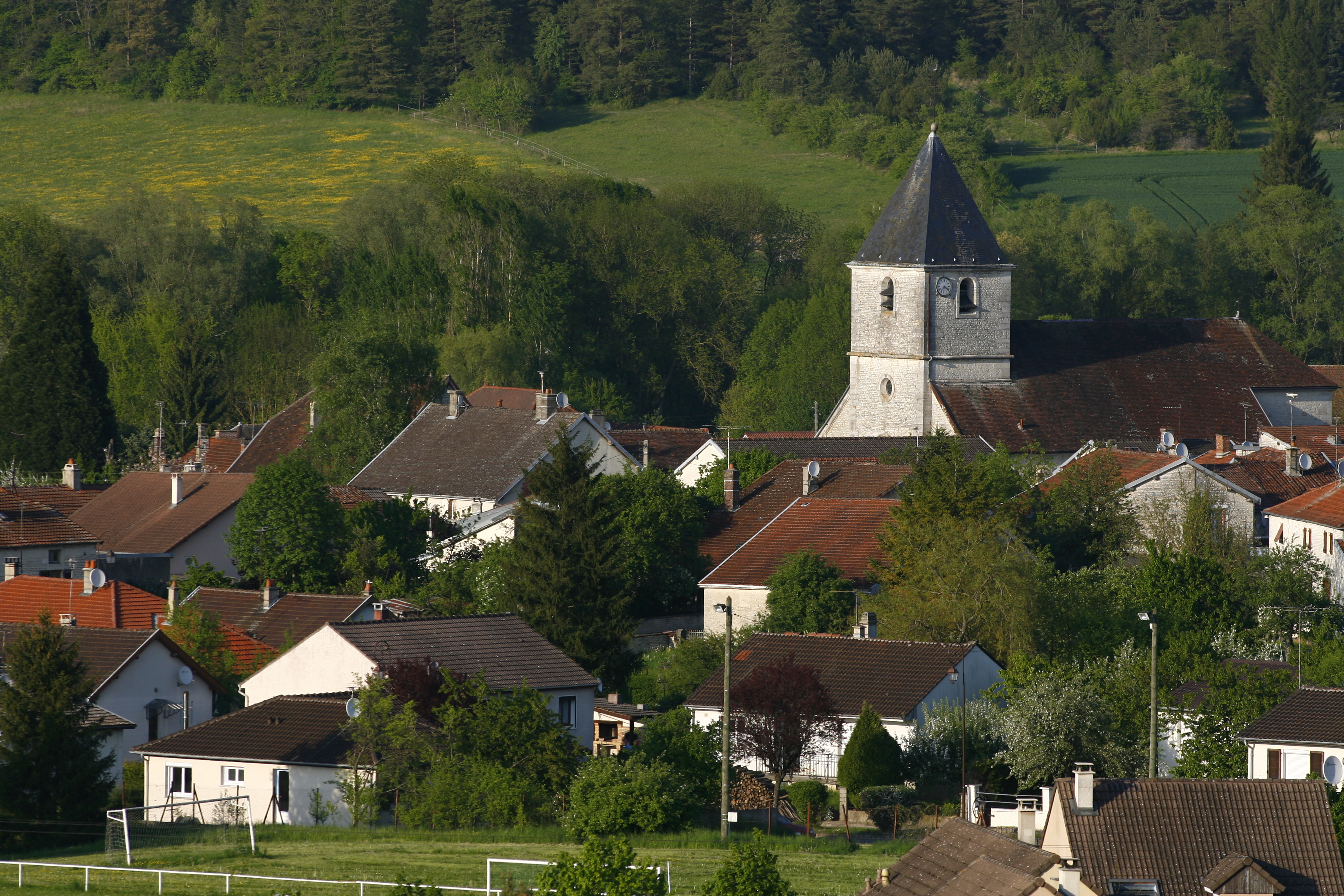 Longchamp-sur-Aujon (mai 2008)